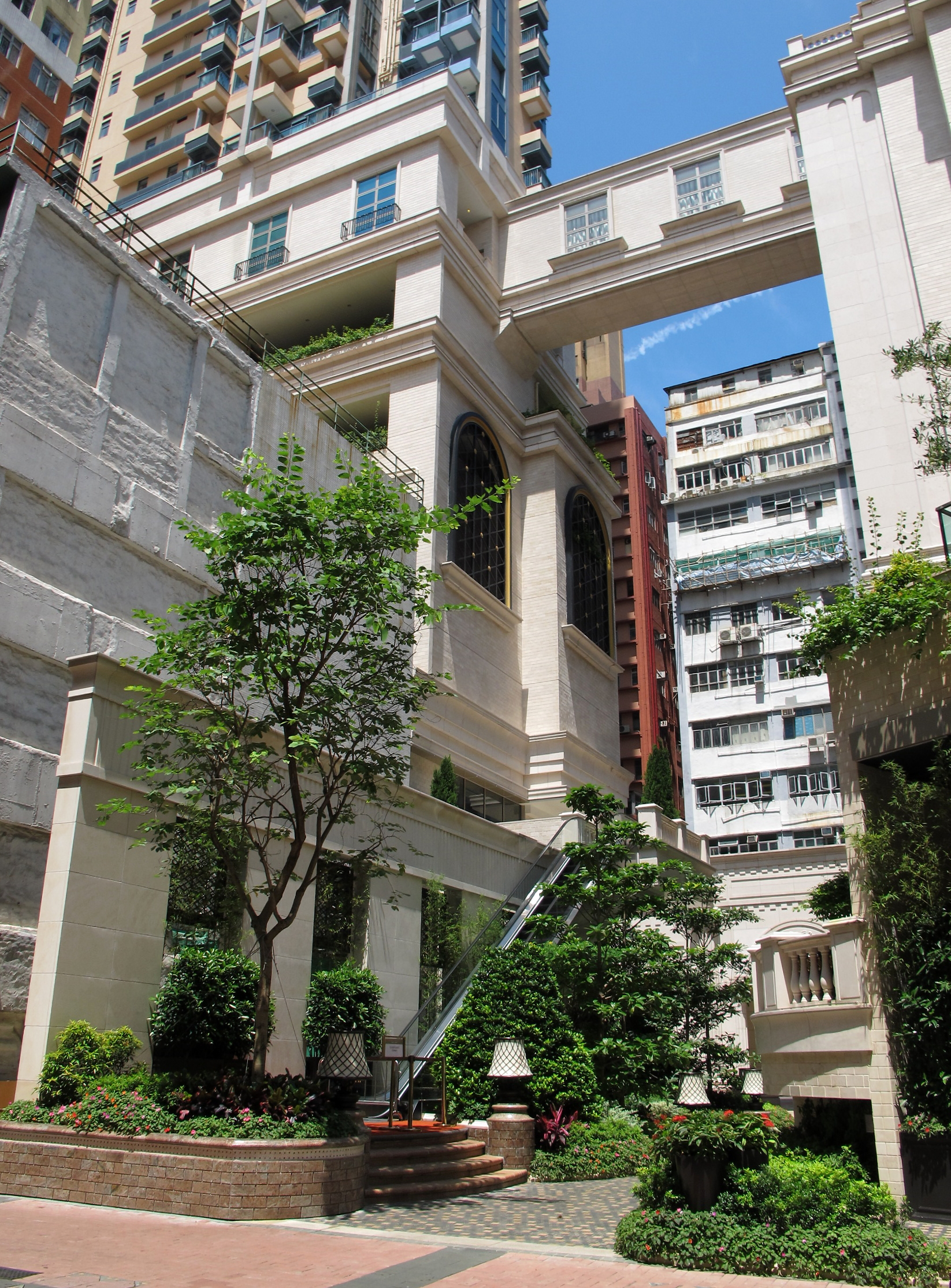 Park Summit GF Open Space